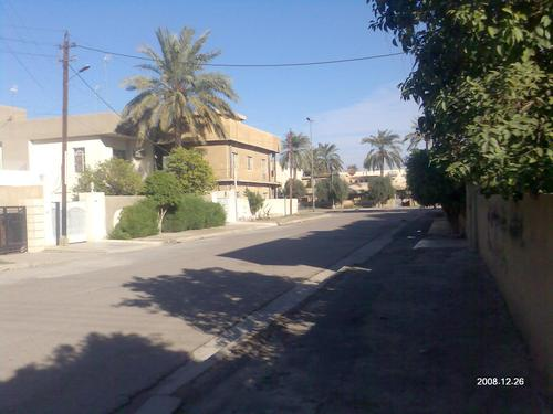 احدى احياء منطقة الصليخ شارع 600